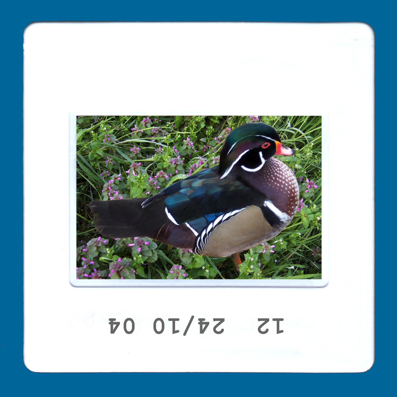 Questa immagine mostra una diapositiva di piccolo formato (24 mm x 36 mm) montata su telaietto. Foto scattata da Magica il 24 ottobre 2004. Immagine caricata dall'autore su Wikipedia con licenza GFDL.